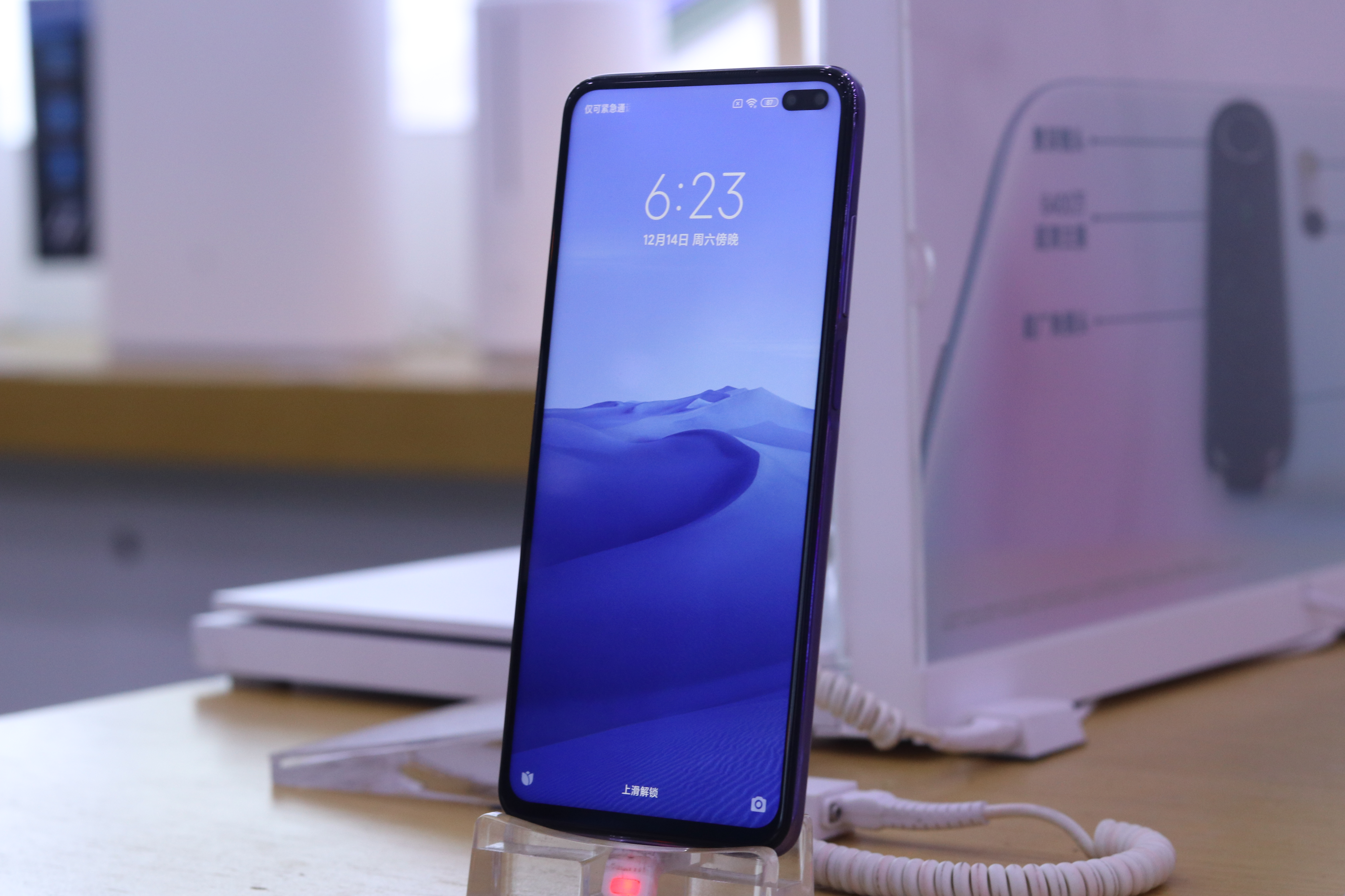 中文（中国大陆）: Radmi K30 正面照，北辰三角洲小米之家拍摄